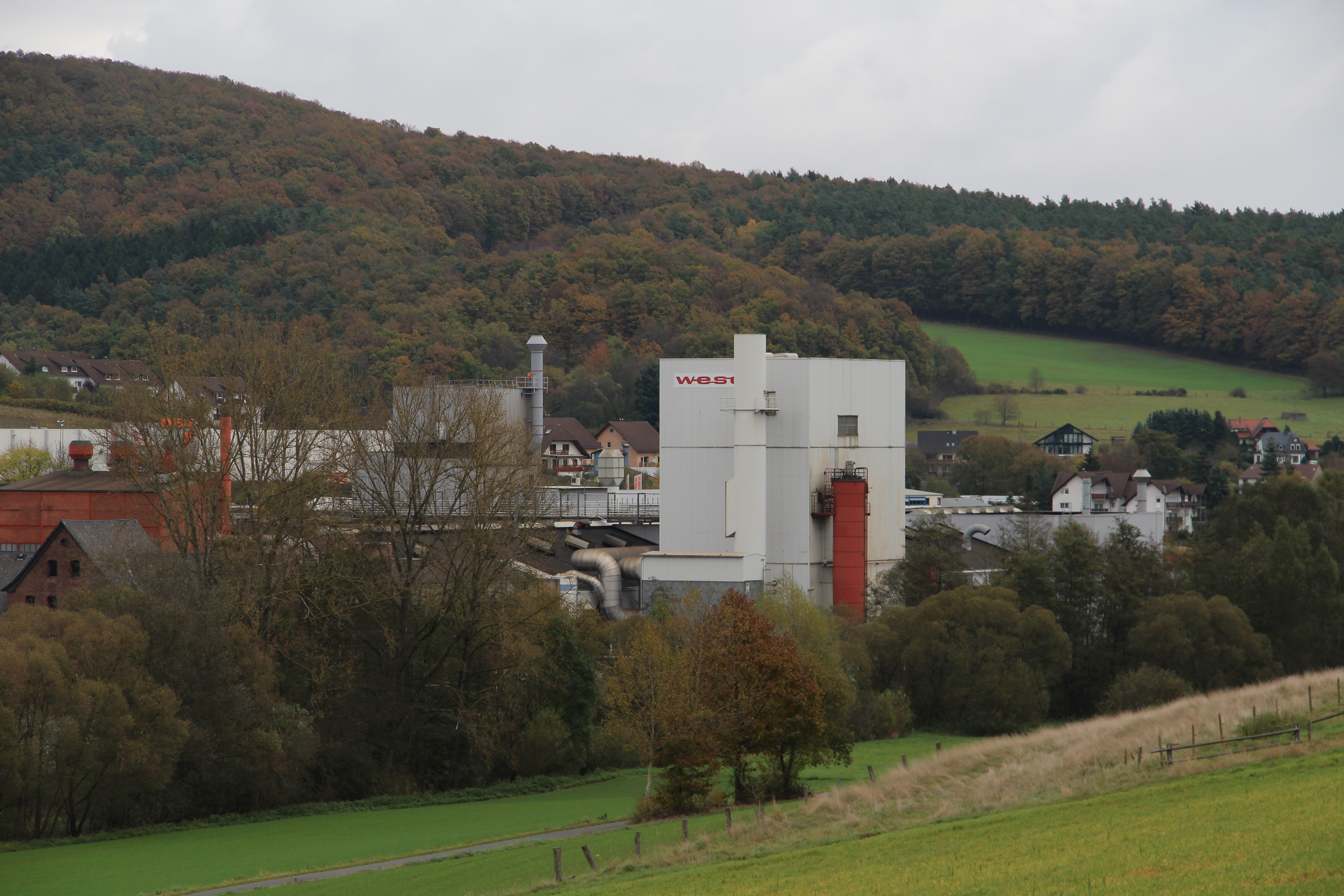 WESO Hütte